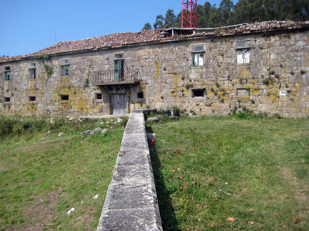 Casa reitoral de San Xulián de Moraime, Igrexa do século XII, Muxía, Galicia, Spain